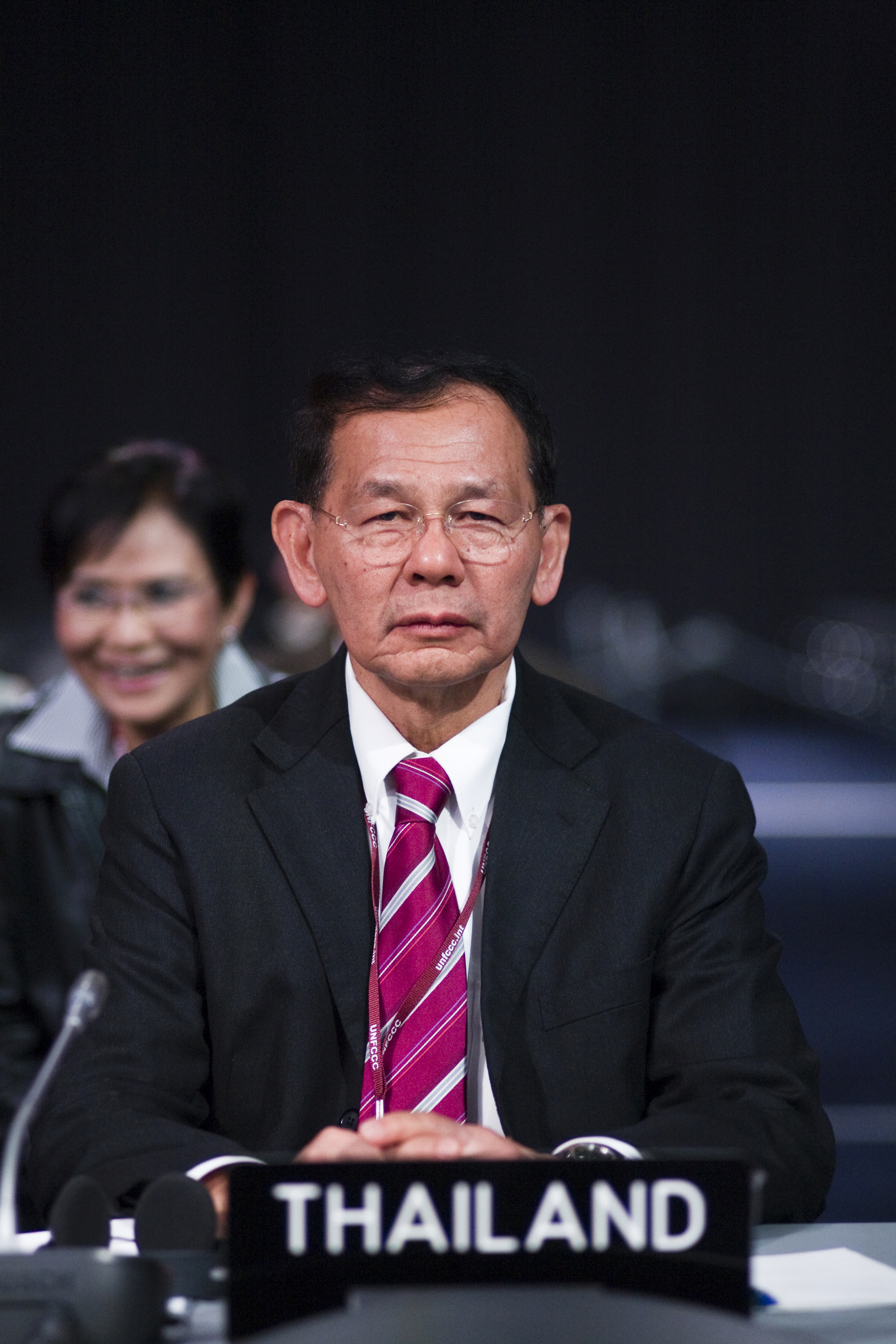 นพ.วรรณรัตน์ ชาญนุกูล / นายกรัฐมนตรีและคณะ เข้าร่วมการประชุมระดับสูง High Level Segment ของรัฐภาคีภายใต้กรอบอนุสัญญาสหประชาชาติว่าด้วยการเปลี่ยนแปลงสภาพภูมิ อากาศสมัยที่ 15 และพิธีสารเกียวโตสมัยที่ 5 ณ Bella Center กรุงโคเปนเฮเกน ประเทศเดนมาร์ก 17ธันวาคม2552 (The Official Site of The Prime Minister of Thailand Photo by พีรพัฒน์ วิมลรังครัตน์)